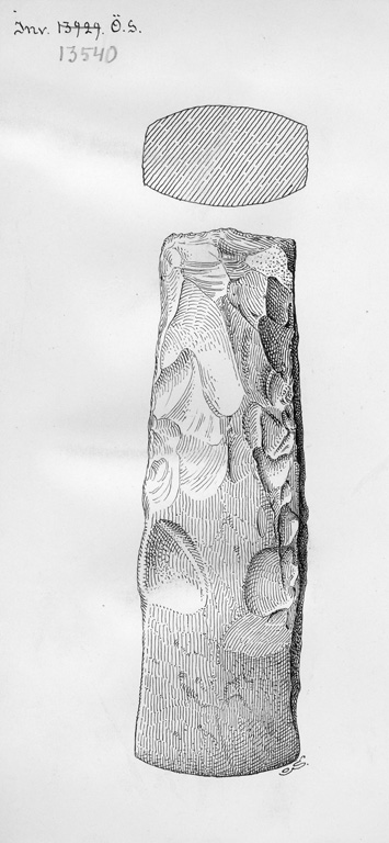 Teckning av fyrsidig flintyxa. Signatur Olof Sörling. Motiv: Alvastra pålbyggnad Nyckelord: Riksintressen Kategori: Arkeologiskt material, Boplats Teckning av fyrsidig flintyxa. Signatur Olof Sörling.